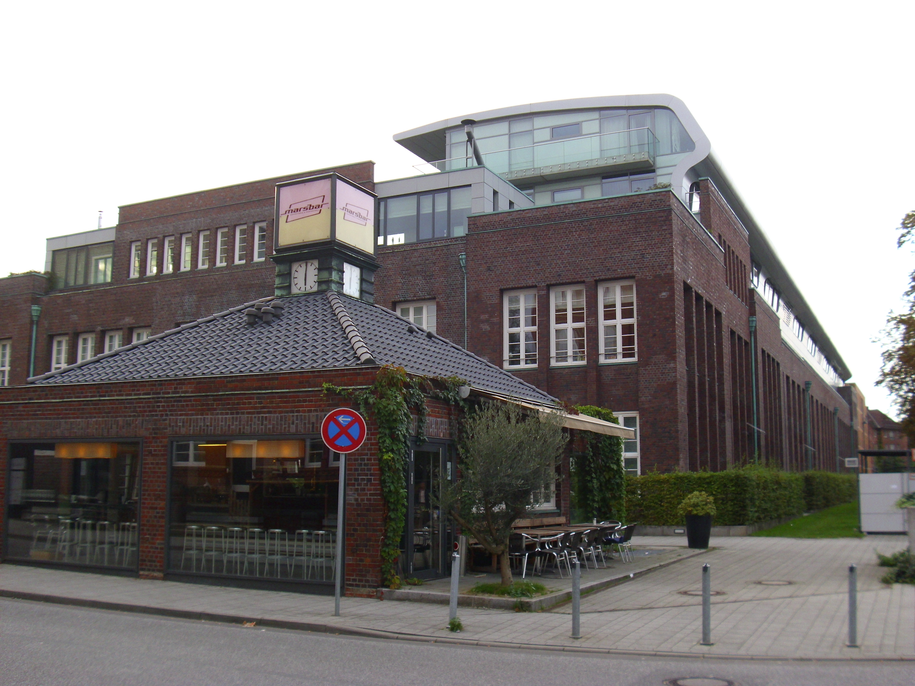 Ehemalige Fahrzeugwerkstätten Falkenried. Blick von der Ecke Straßenbahnring, Falkenried This is a photograph of an architectural monument.